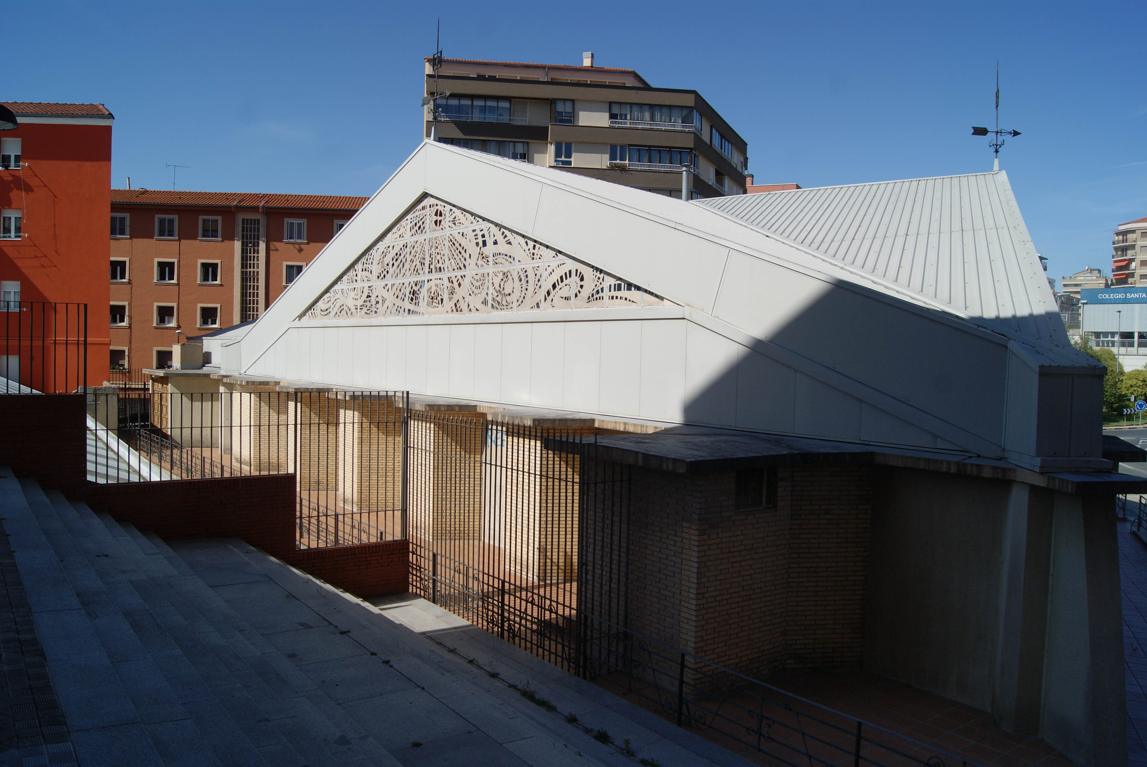 Iglesia de San Fermin (Pamplona) - Cabecera de la parroquia situada en el Barrio de La Milagrosa